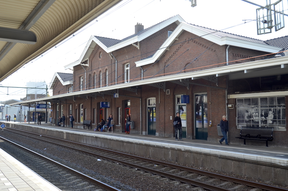 Station Roermond, perronzijde; 17 april 2015. Foto: Erik Swierstra.